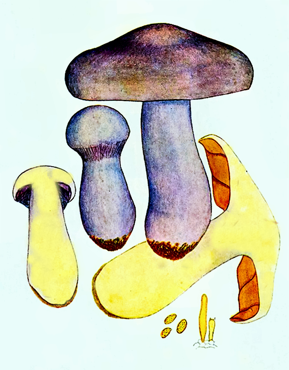 Giacomo Bresadola: Cortinarius traganus